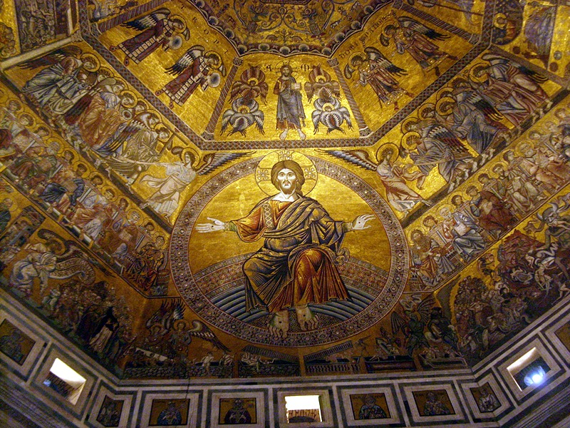 Firenze - Mosaici del secolo XIII che rivestono l'interno della cupola del Battistero